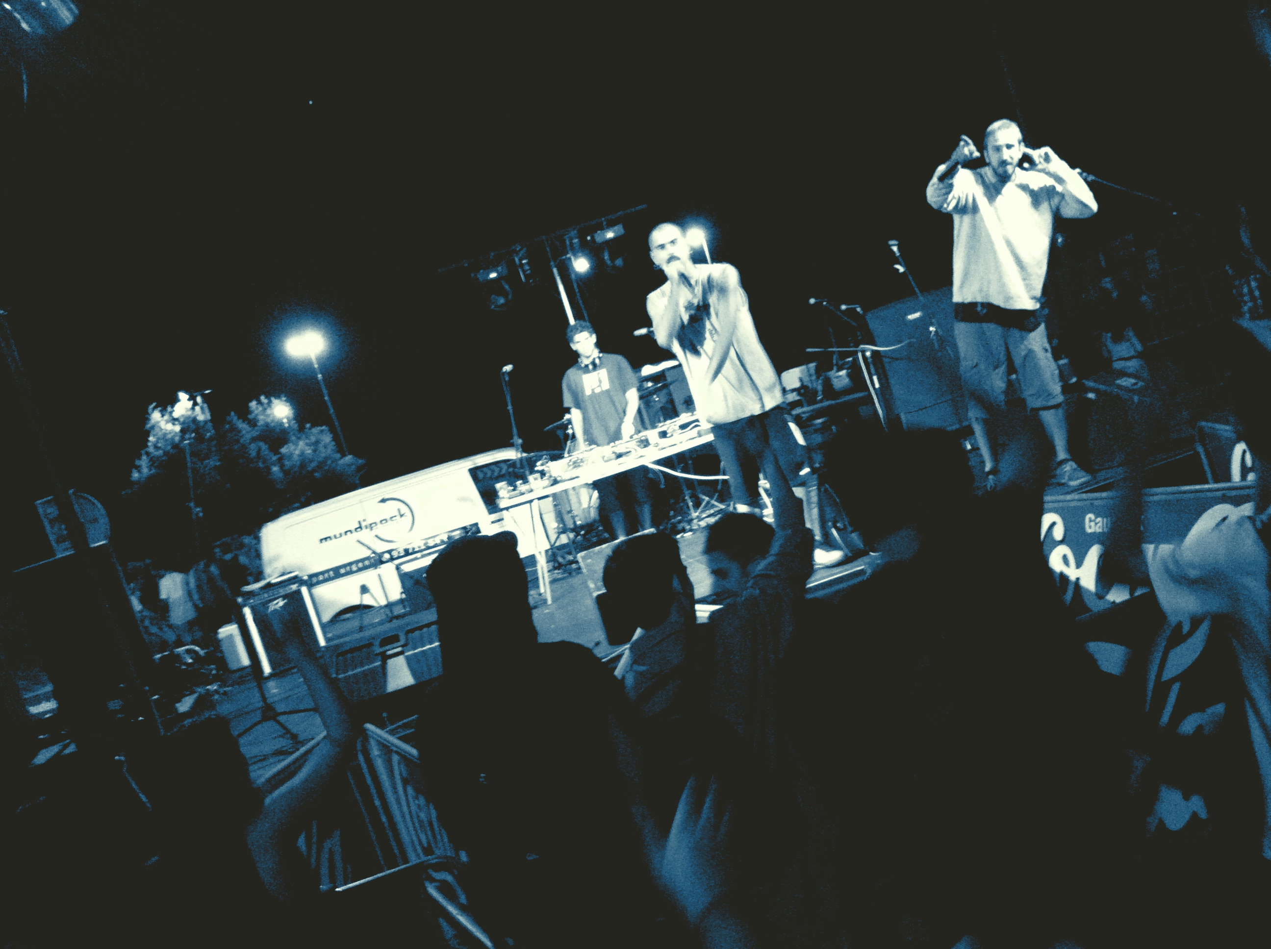 Agost 2011